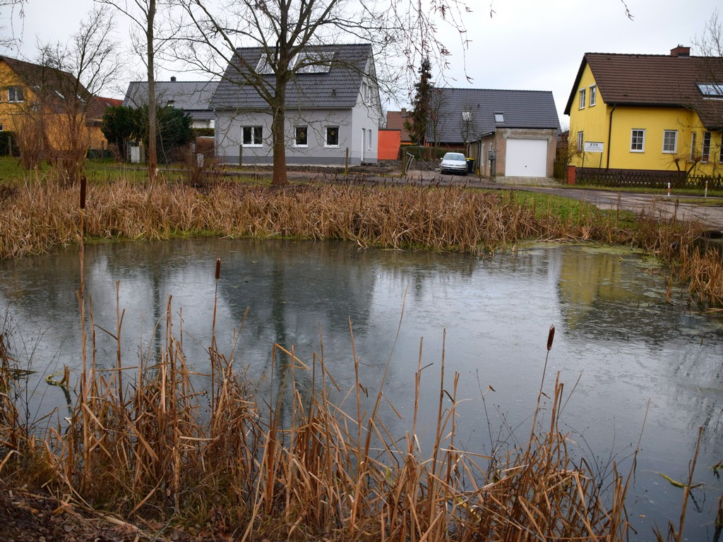 Schäferbergteich in Frankfurt (Oder)-Booßen